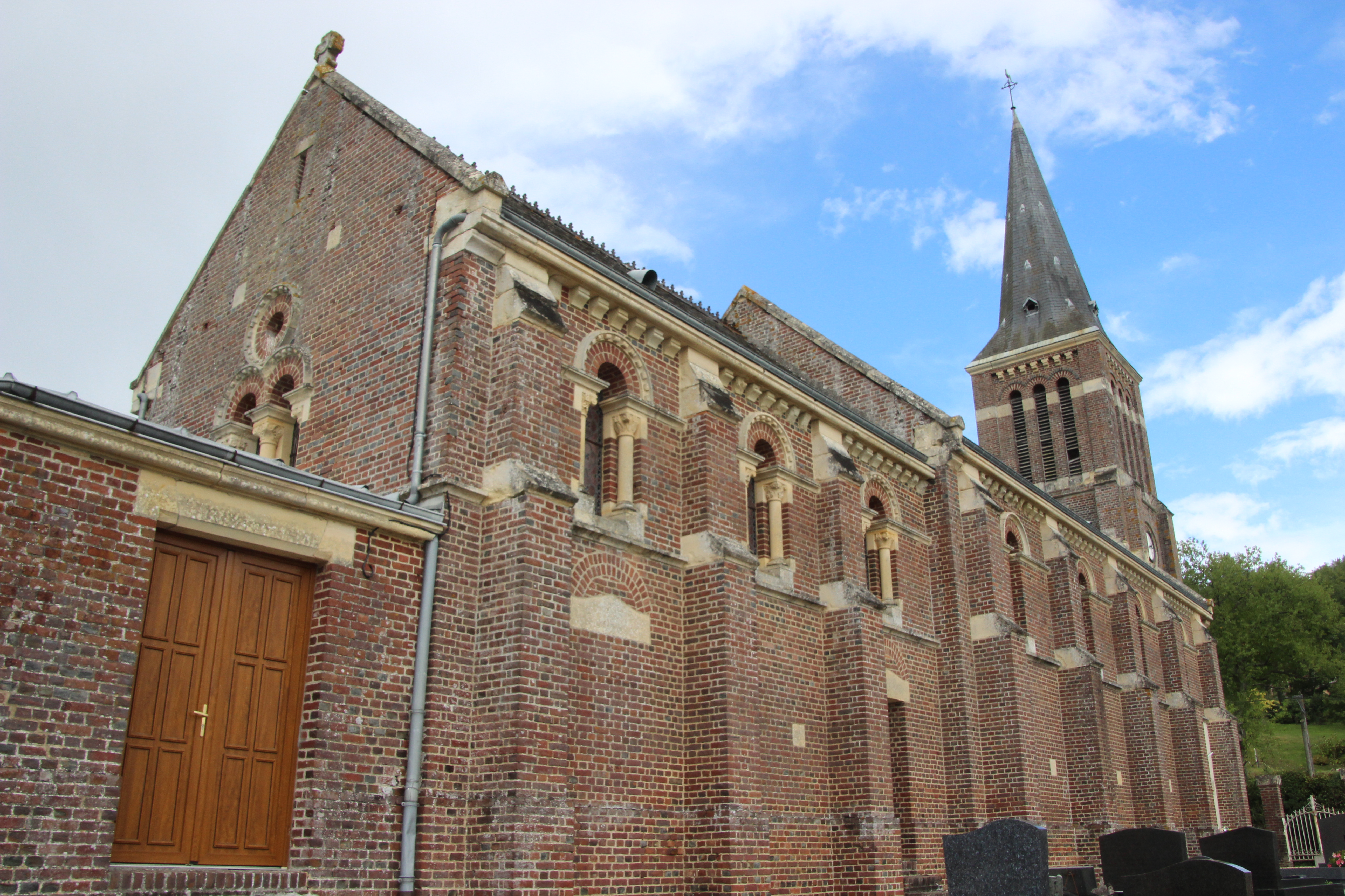 église du Mesnil Simon